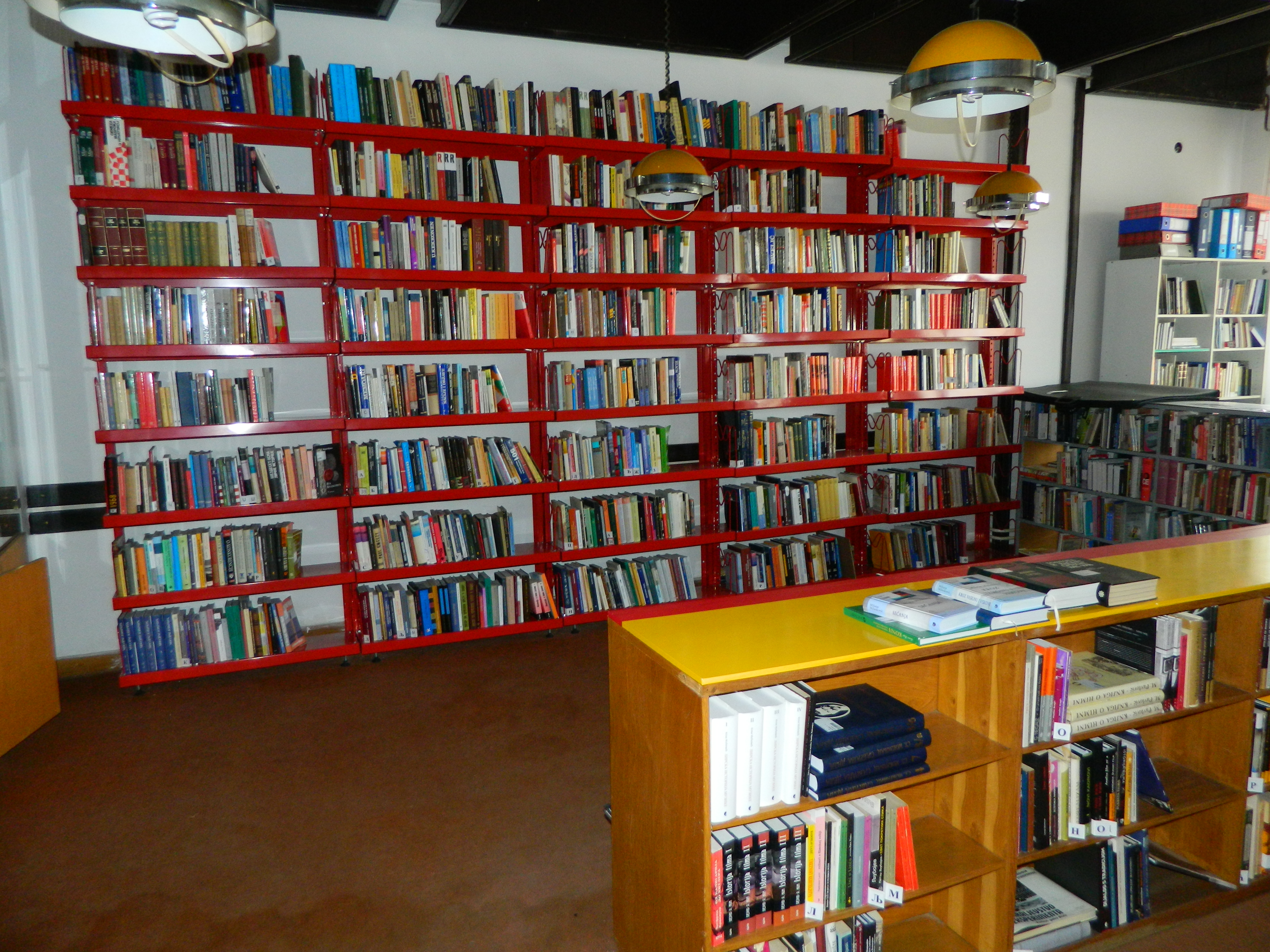 Narodna biblioteka Pirot.